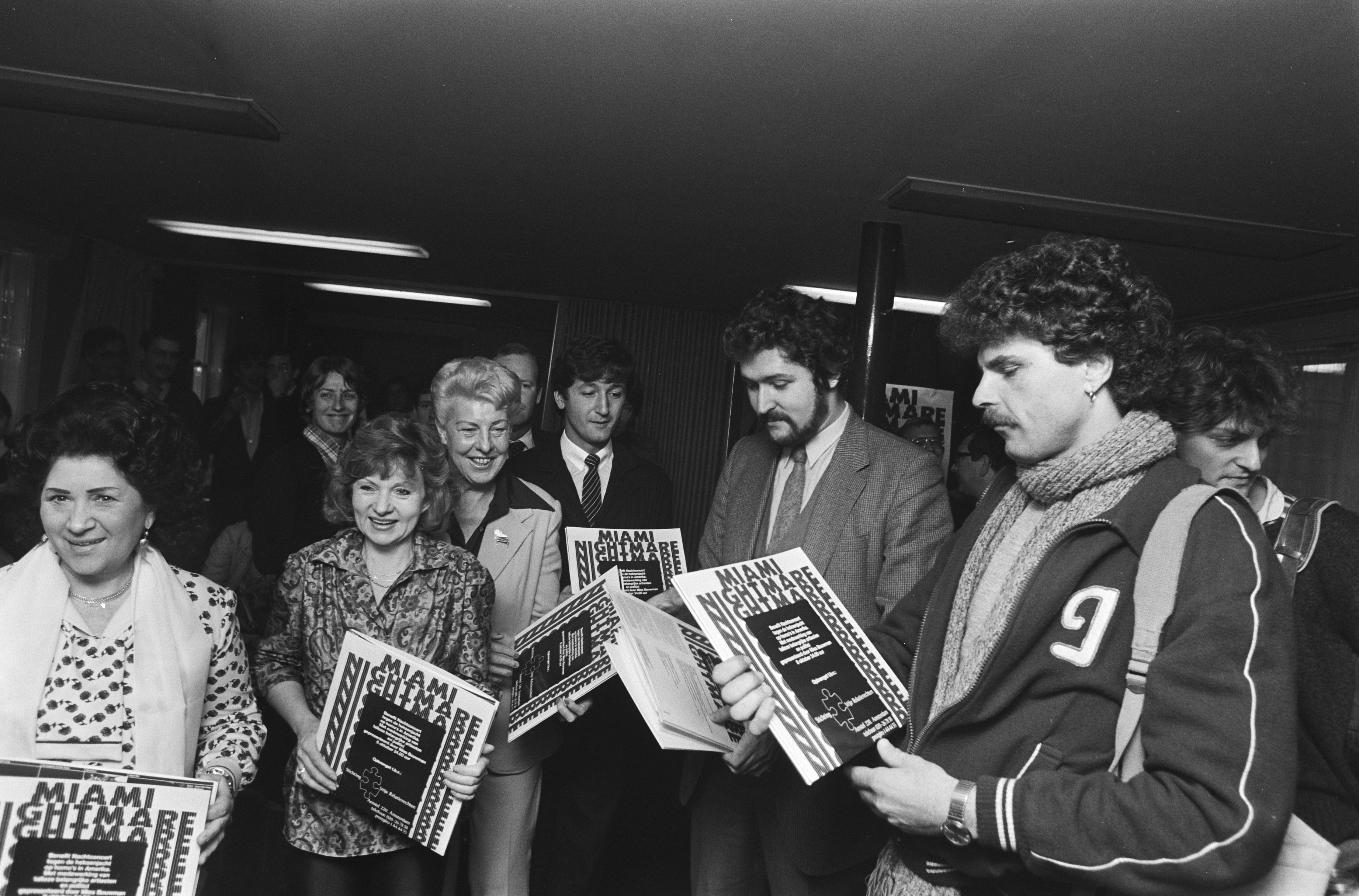 In Den Haag de plaatopname presentatie van Miami Nightmare, een 3 jaar eerder gegeven benefietconcert tijdens anti Anita Bryantmanifestatie. Vlnr. Zangeres zonder Naam, Sylvia de Leur, Pia Beck, Manfred Langer, Henk Krol en Robert Long. 27 november 1980